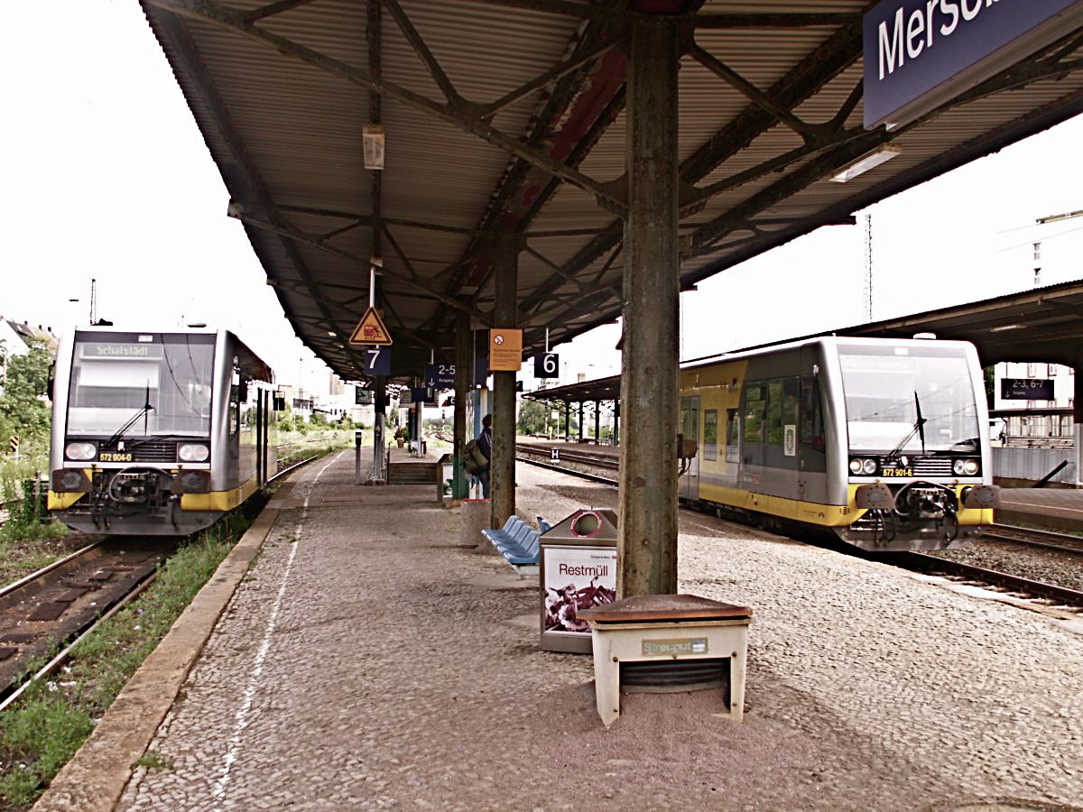 Bahnstrecken um Merseburg, Triebwagen der Burgenlandbahn im Bahnhof Merseburg